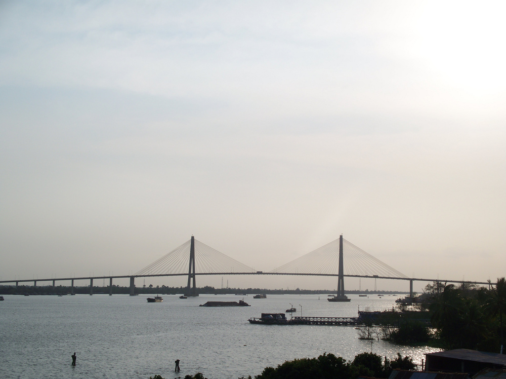 Brücke über Mekong